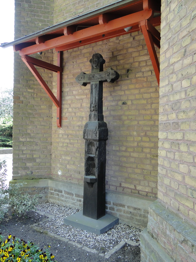 Das Holzkreuz wurde um 1700 an der Ecke Abt- und Geislarstraße als Wegekreuz errichtet. 200 Jahre später auf den Kirchplatz von St. Joseph, gegenüber dem Hauptportal, und 2004 an seinen jetzigen Platz versetzt. Inschrift: keine